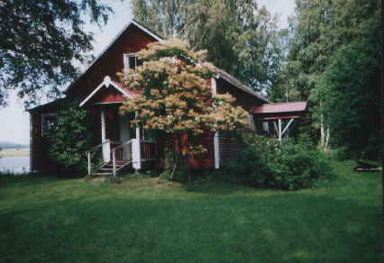 Storstugan on Viljan, Nötholmen, Hedemora, Sweden.